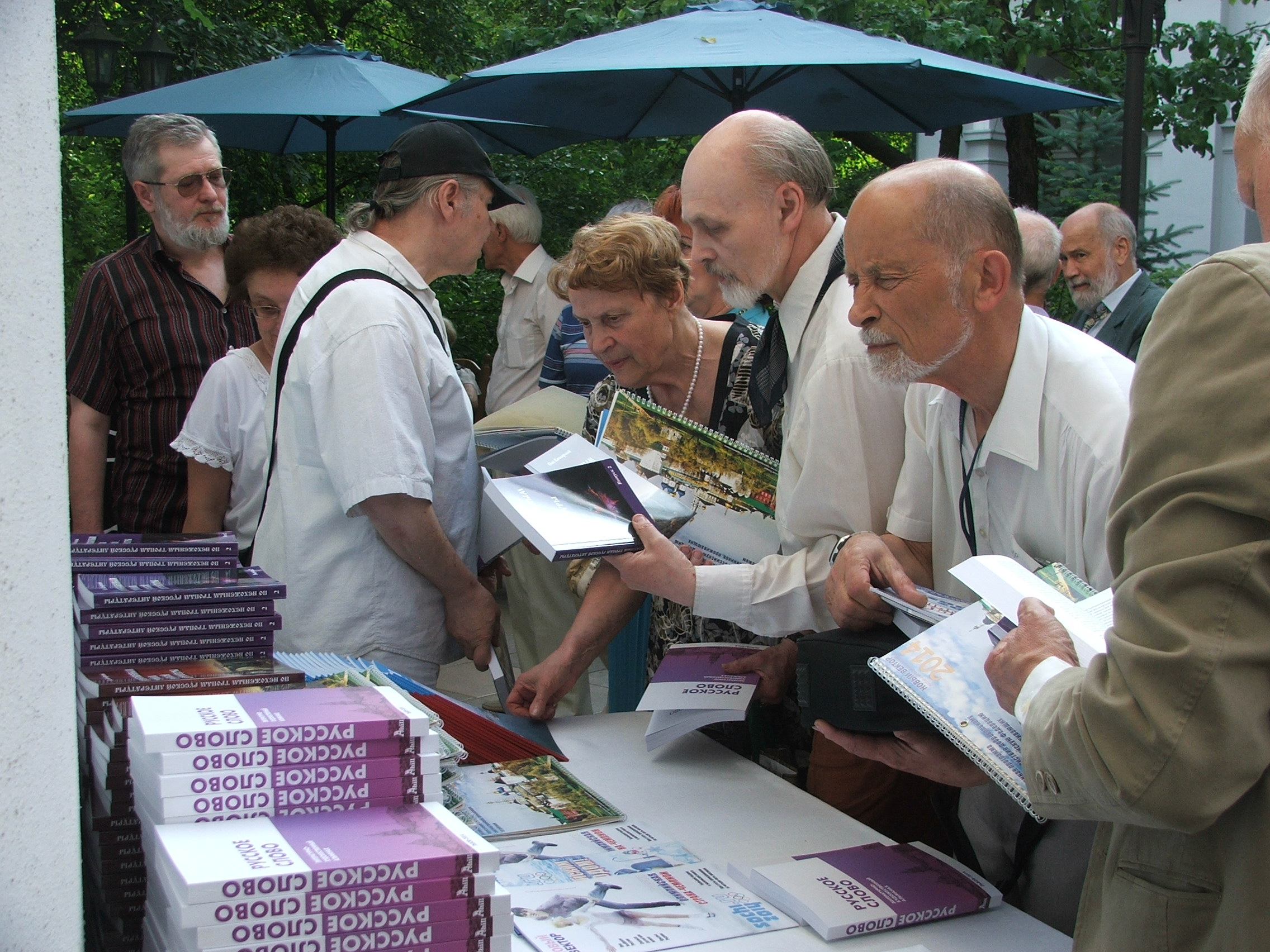 Во Львове состоялась презентация литературно-художественного альманаха «Русское Слово», приуроченная к государственному празднику – Дню России.